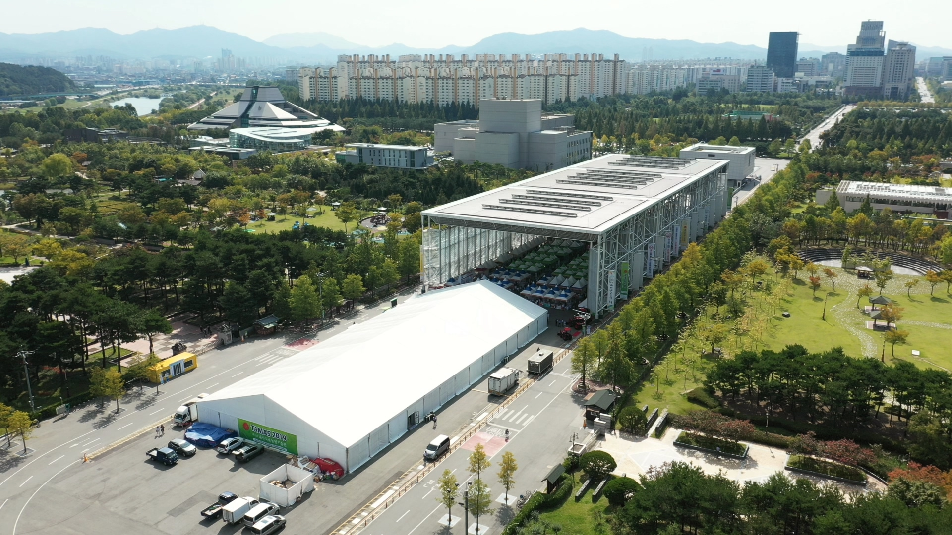 엑스포시민광장